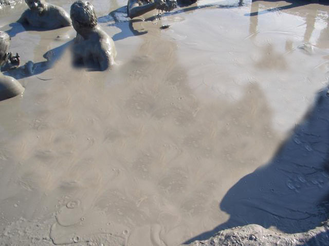 Volcán del Totumo-Baño de barro